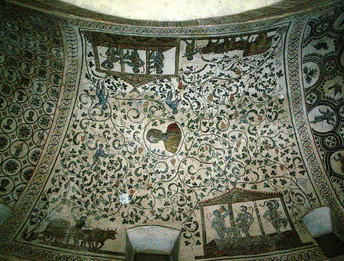 Mausoleo di santa costanza, mosaici